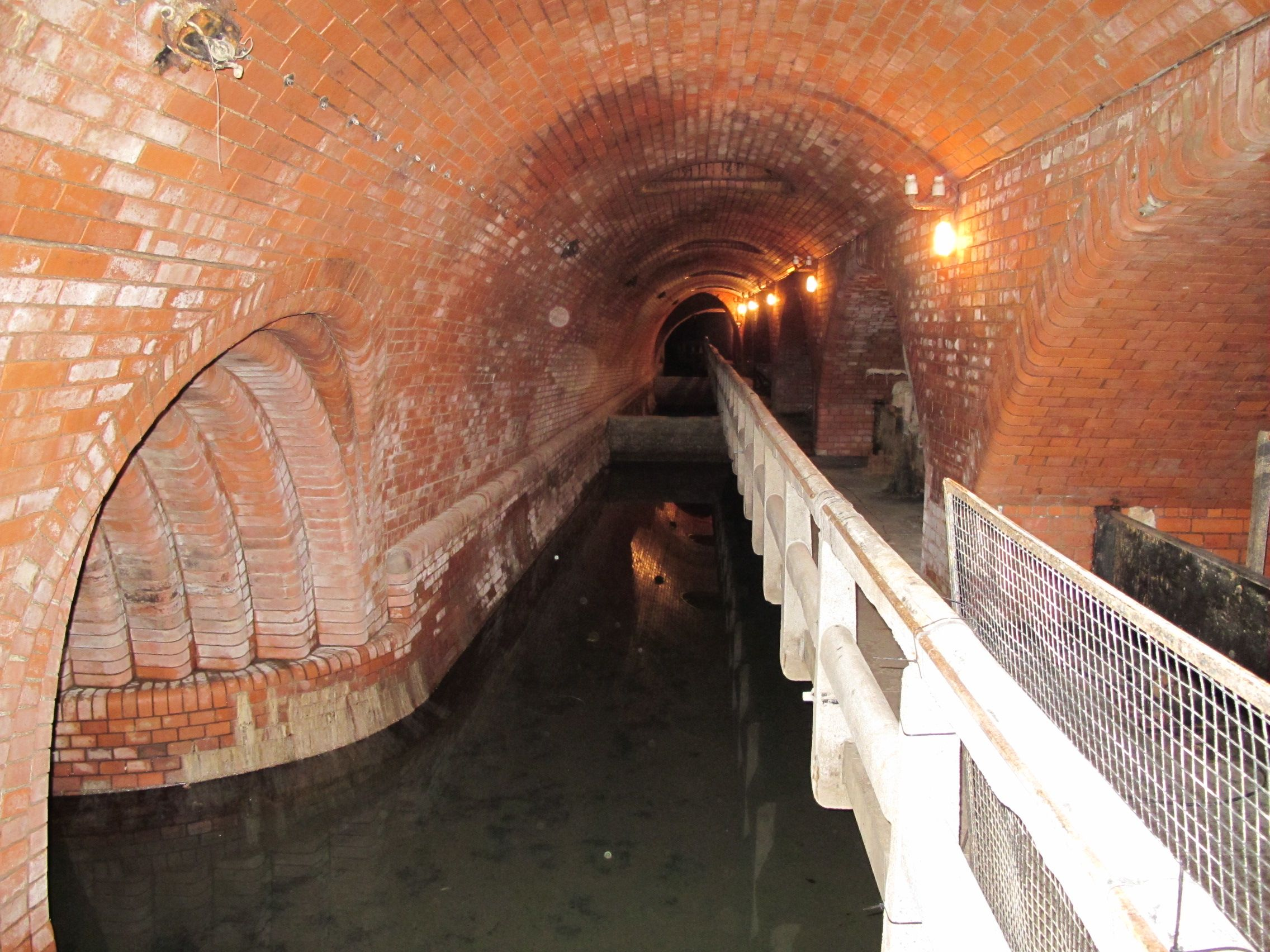 Podzemní prostory čistírny odpadních vod v Bubenči